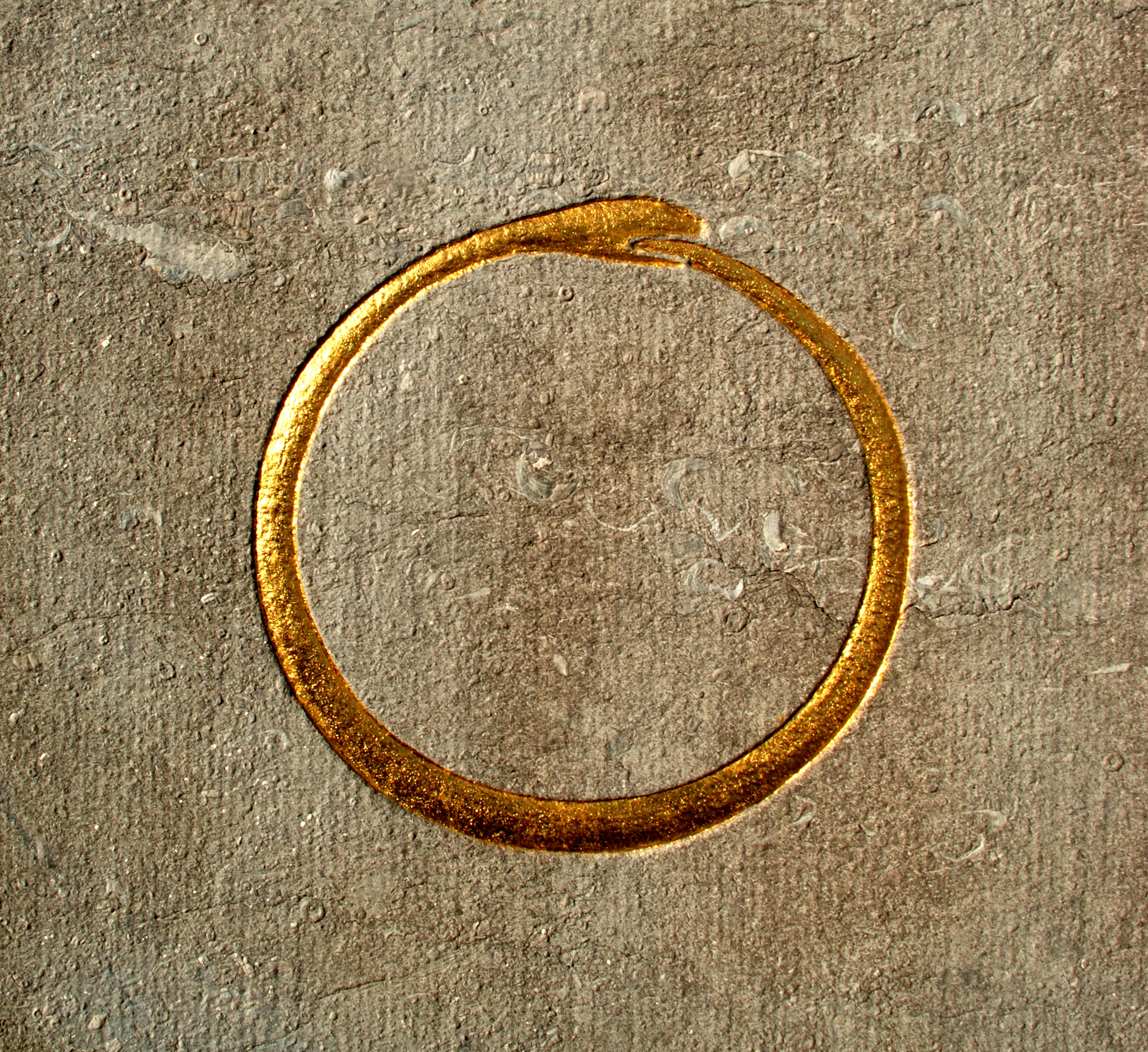 un ouroboros, serpent qui se mord la queue.Belgique - Brabant wallon - Court-Saint-Etienne - Mausolée Goblet d'Alviella - symboles ésotériques